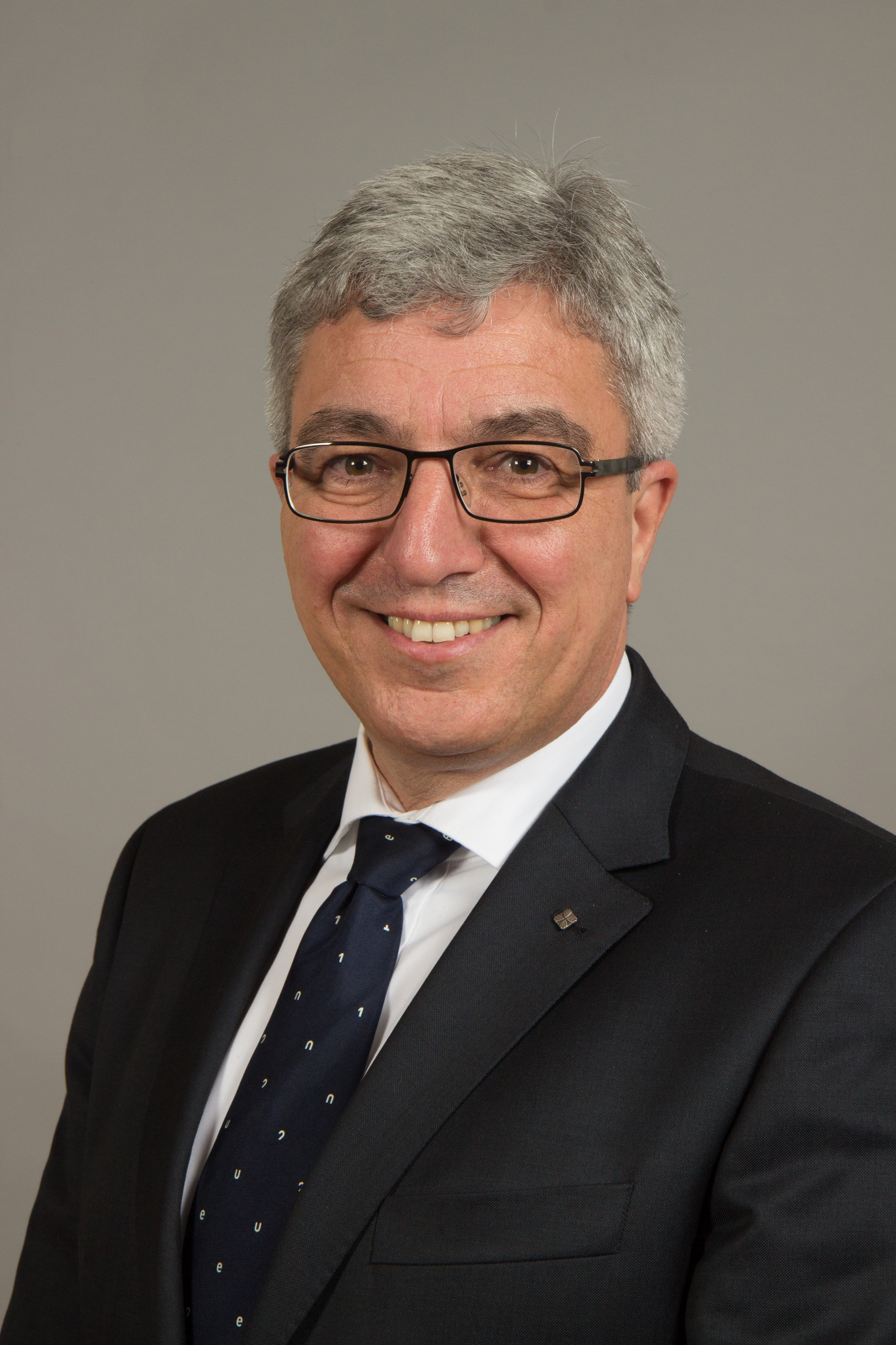 Roger Lewentz, Minister des Innern, für Sport und Infrastruktur von Rheinland-Pfalz Roger Lewentz, Ministère de l'Intérieur de Rhénanie-Palatinat